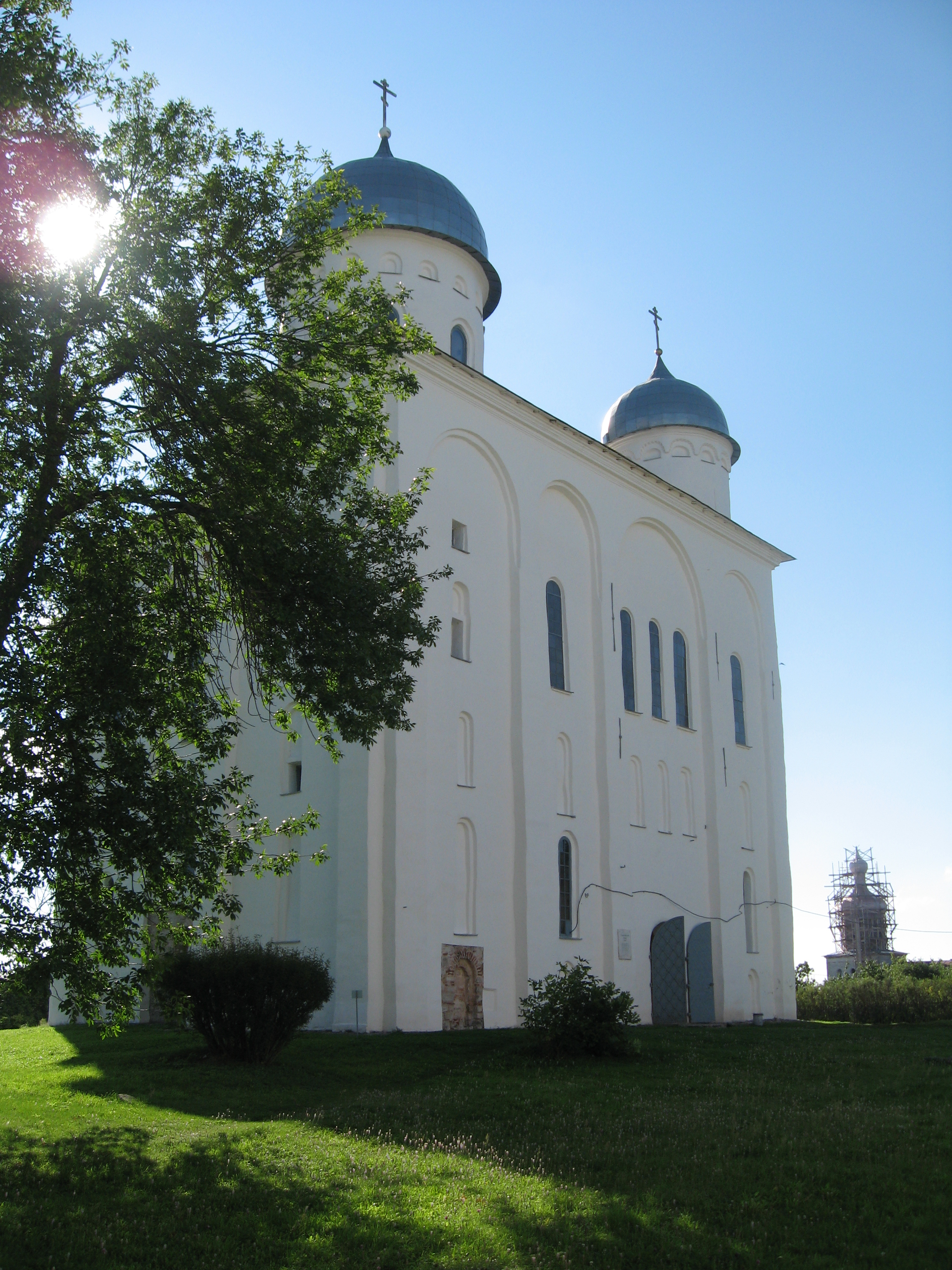 Западный фасад Георгиевского собора Юрьева монастыря.